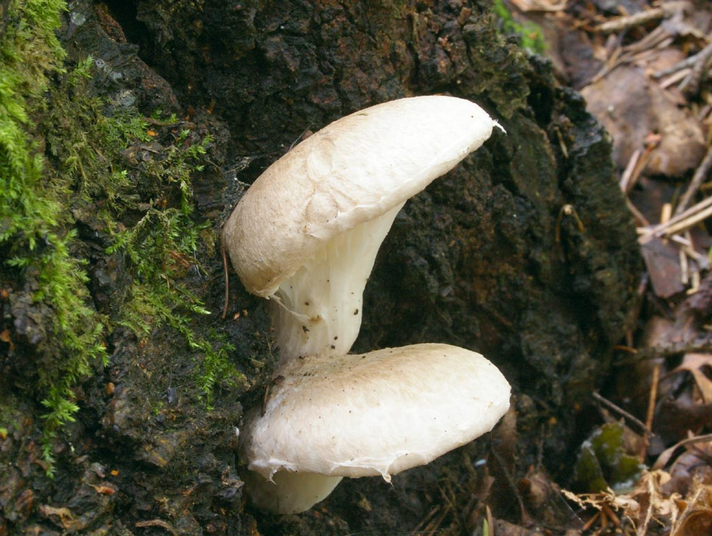 Pleurotus dryinus